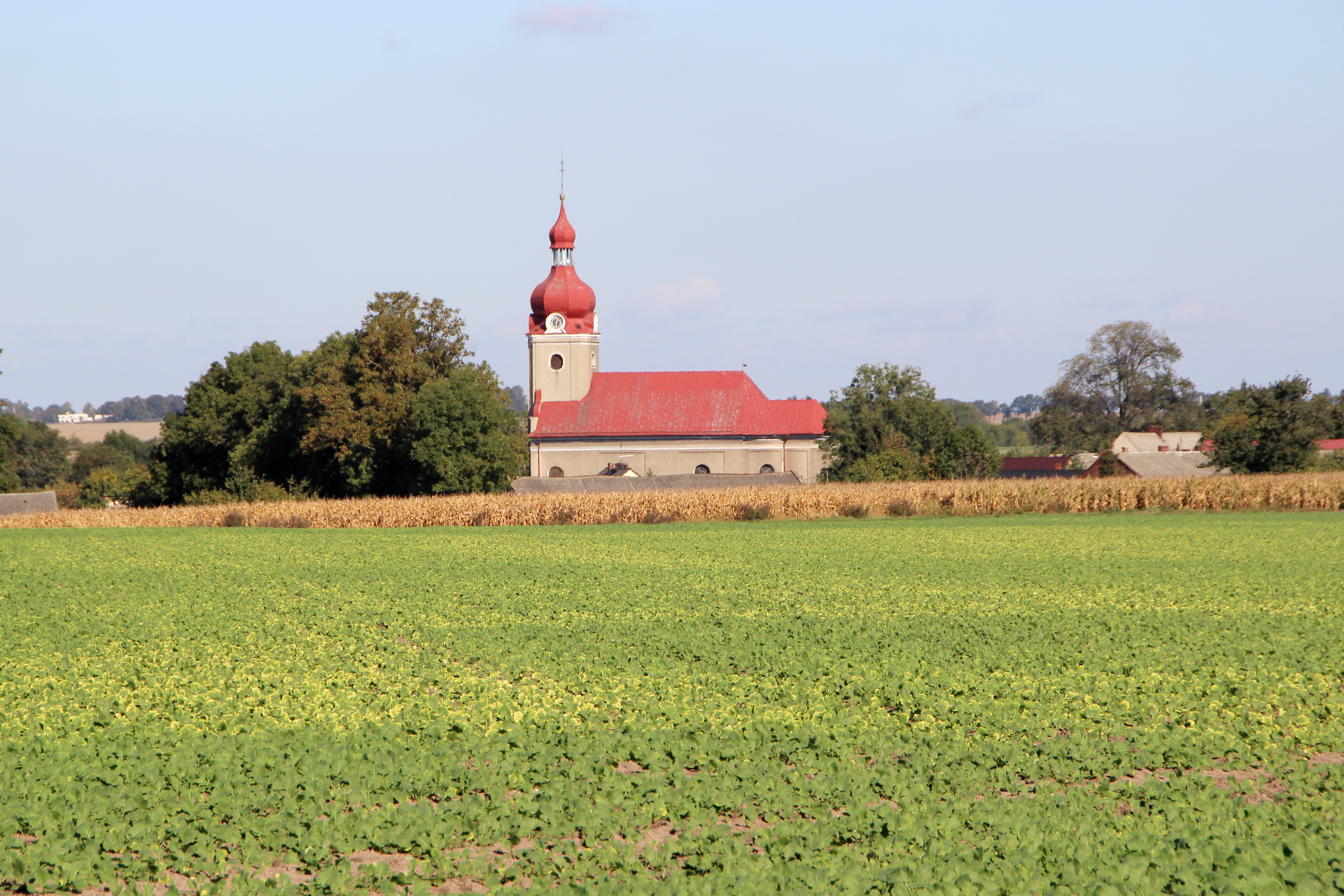 Księże Pole - rzymskokatolicki kościół pararafialny pw. św. Bartłomieja, 1756-63, 1906